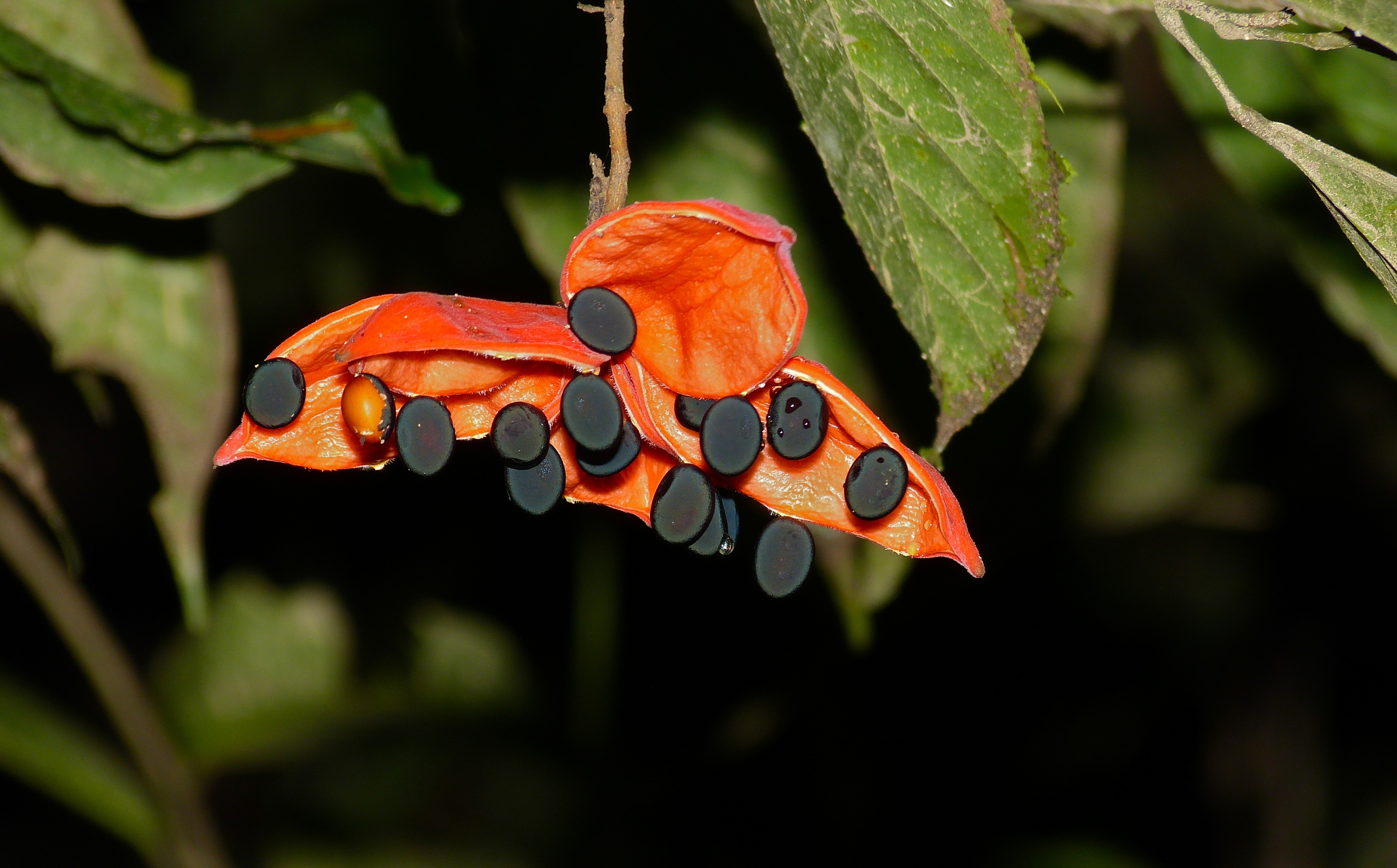 Taman Negara NP, Pahang, MALAYSIA